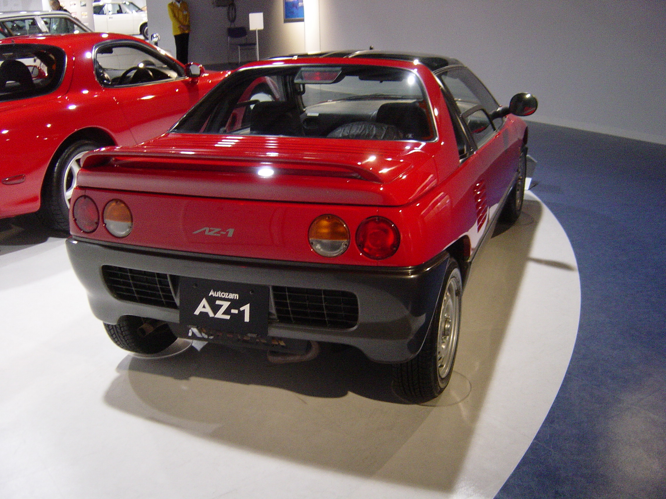 Mazda AZ-1(マツダ・AZ-1),Mazda Museum